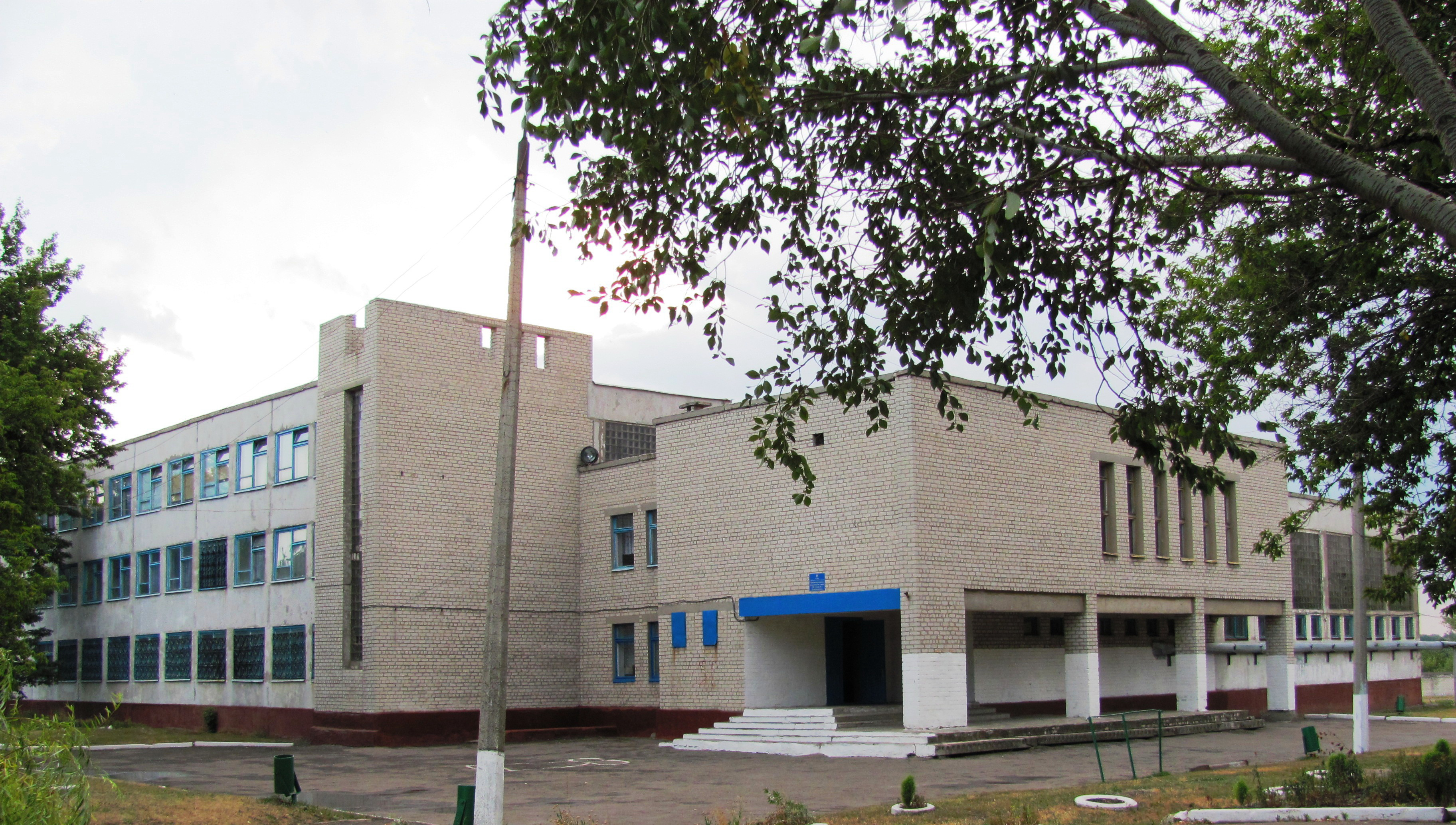 Червонопартизанск